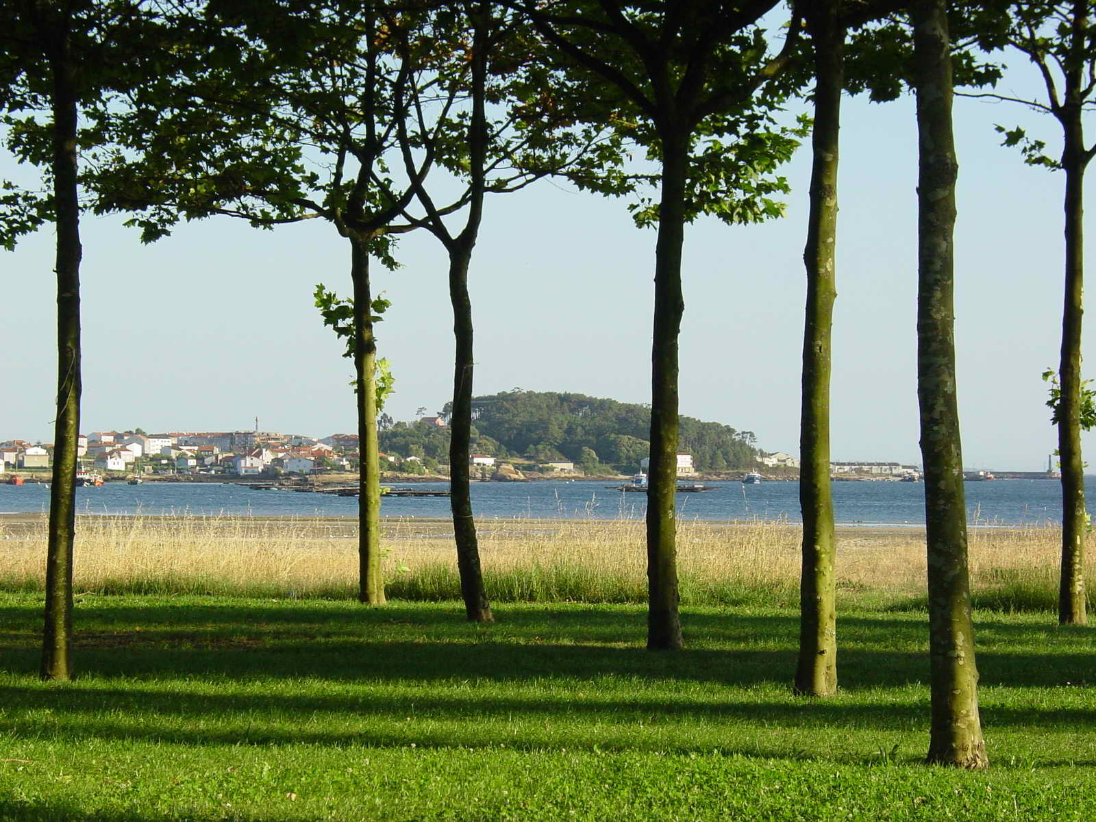 self made. Barraña (Ría de Arousa) - Boiro - Galicia - Spain